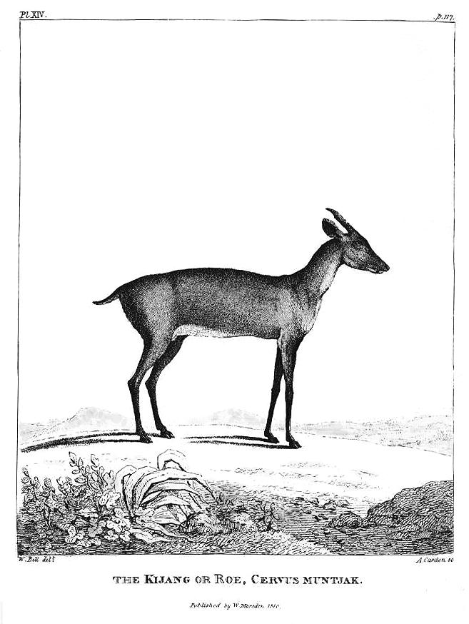 William Marsden: The History of Sumatra. Tafel XIV: Kijang or Roe